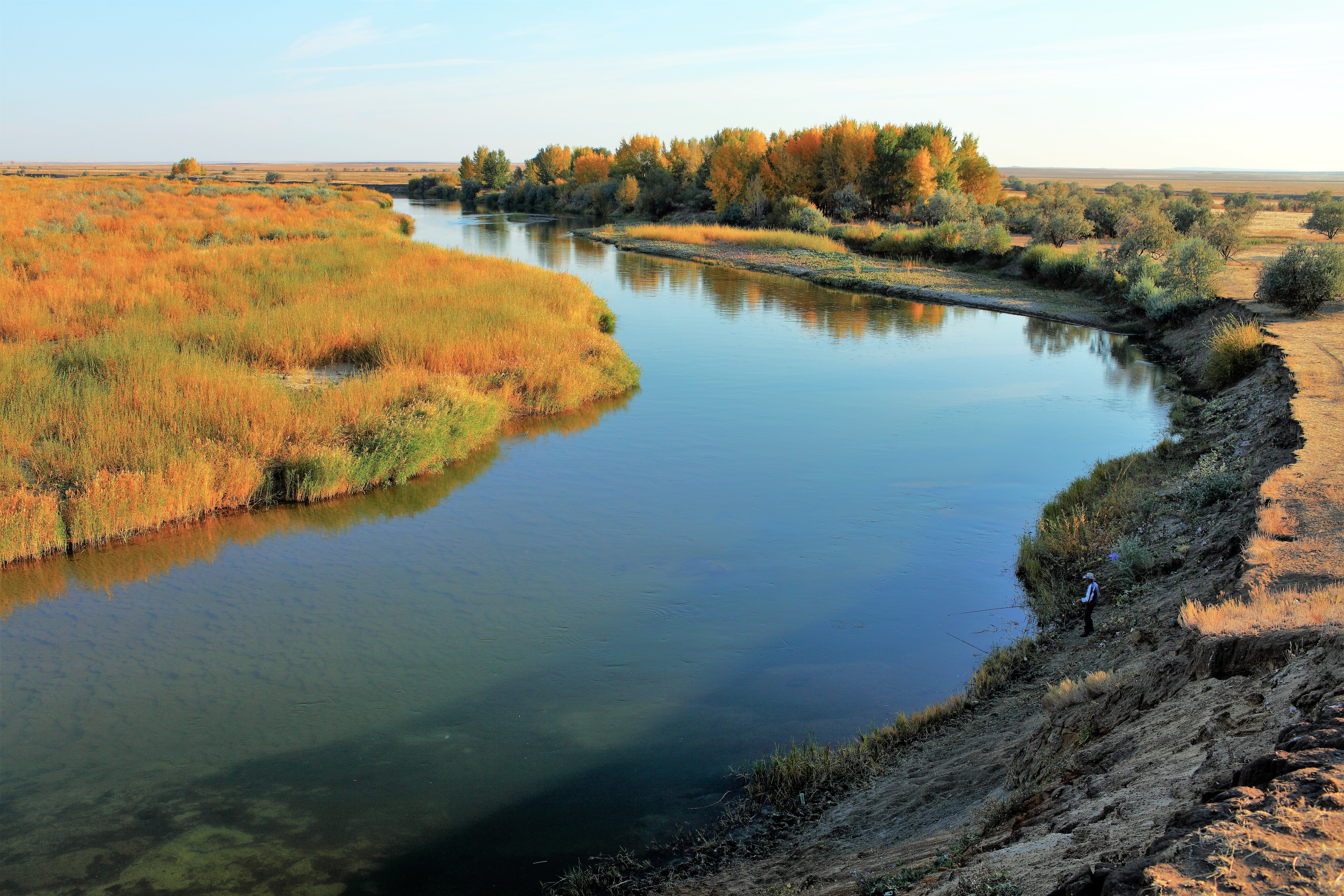 Река Илек в южном направлении